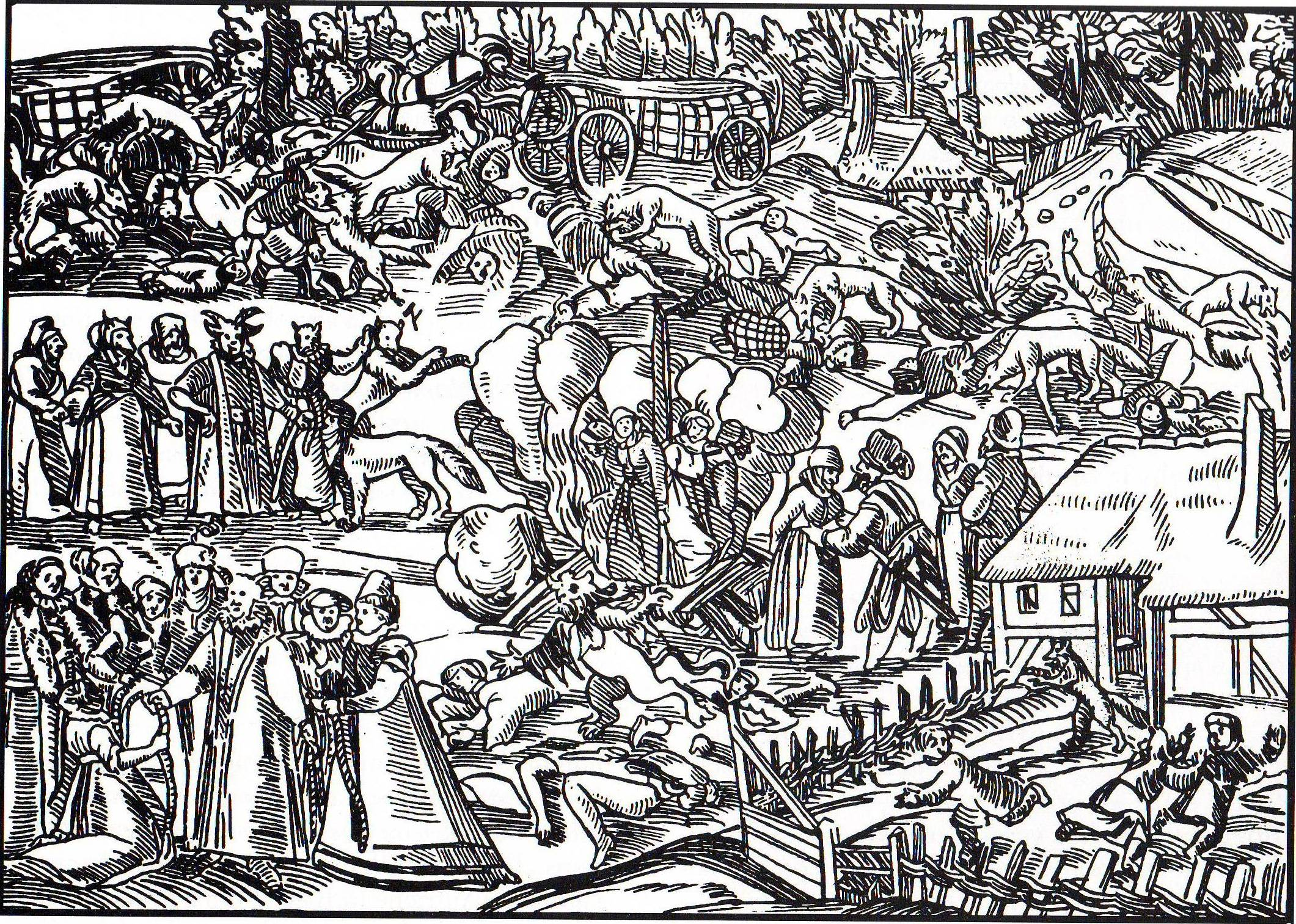 Scènes de sorcellerie dans la principauté de Juliers